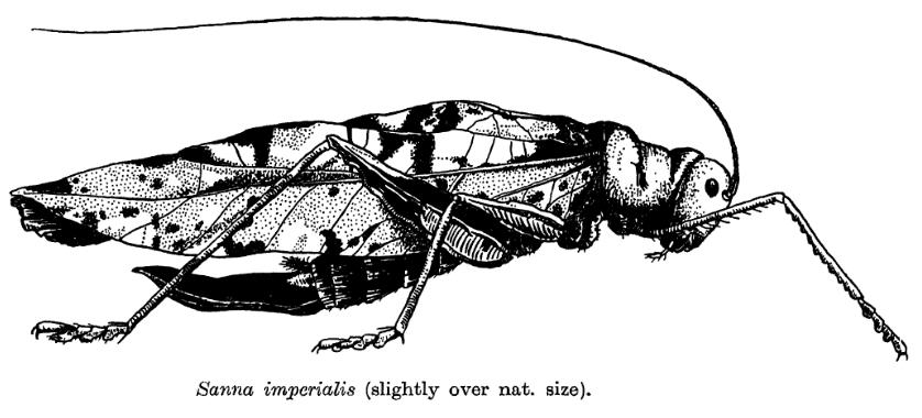 Sanna imperialis, Tettigoniidae, Orthoptera